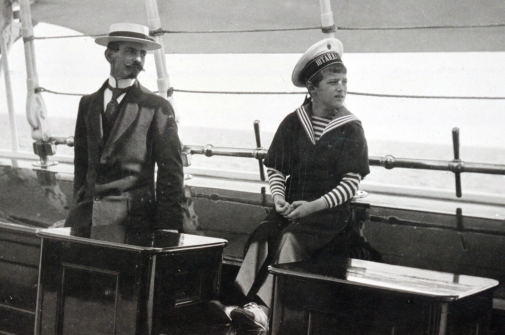 ロシア帝国最後の皇太子アレクセイと一家のフランス語家庭教師ピエール・ジリヤール